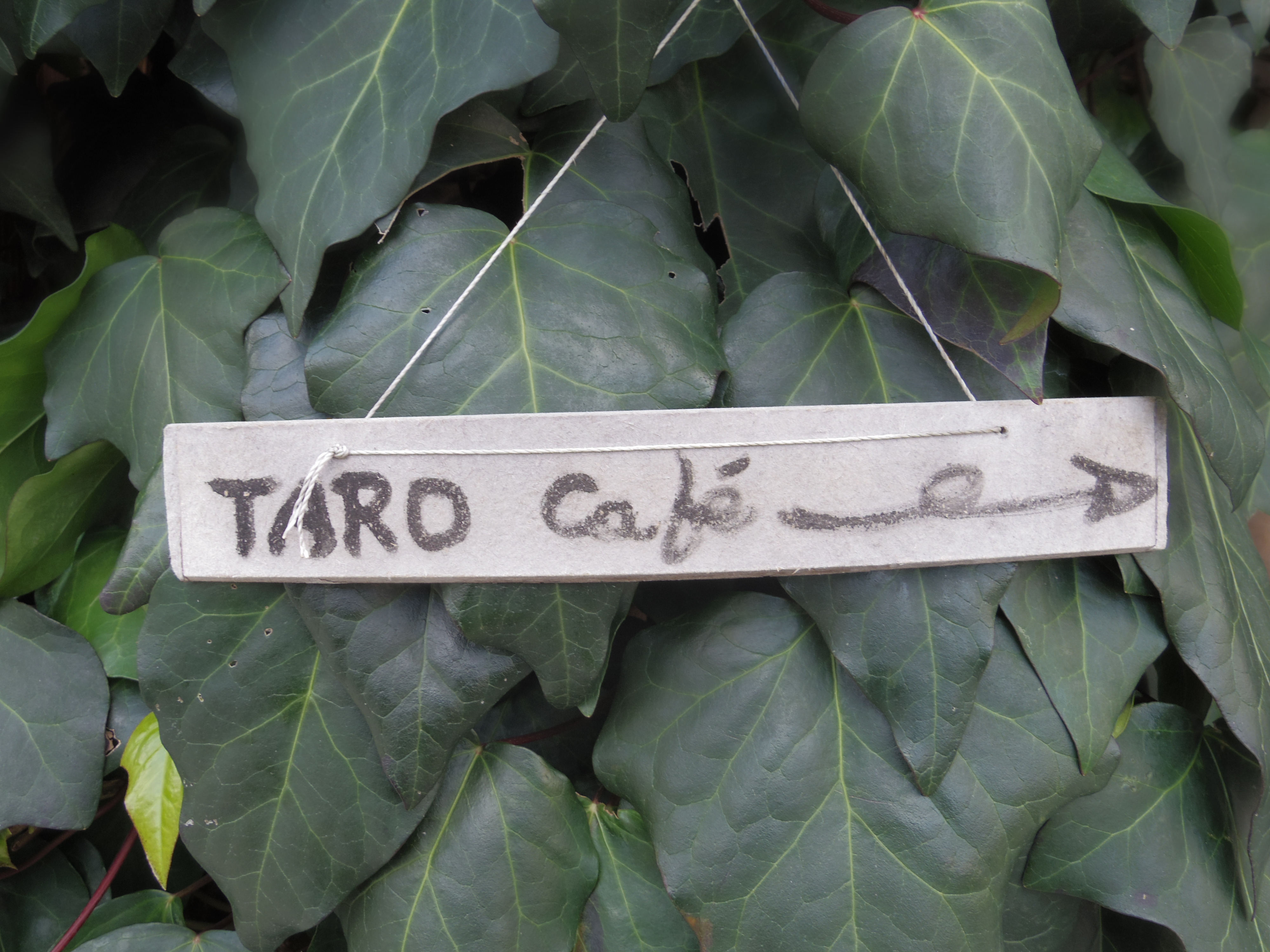 2012年12月撮影